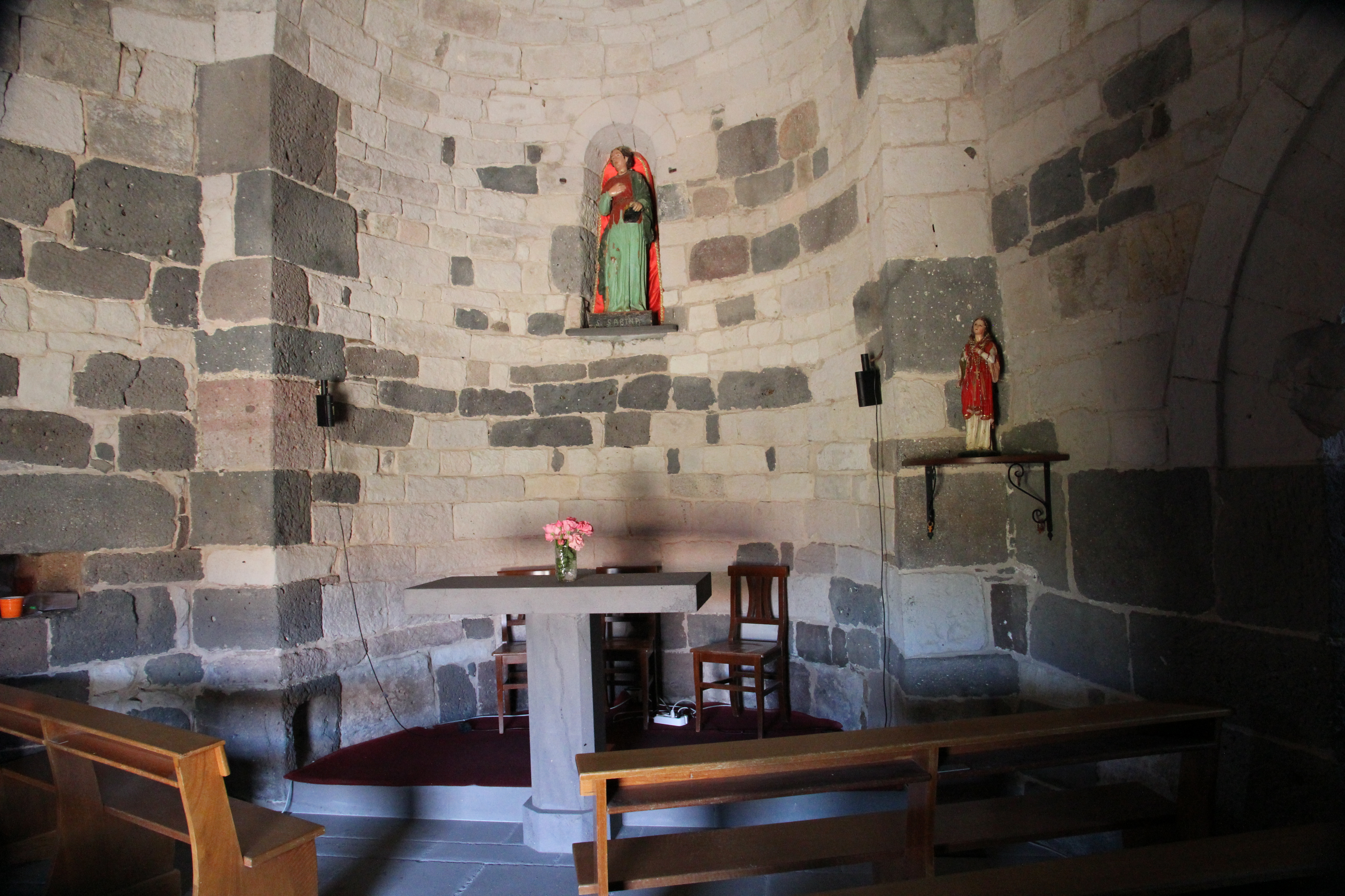 Silanus - Chiesa di Santa Sabina